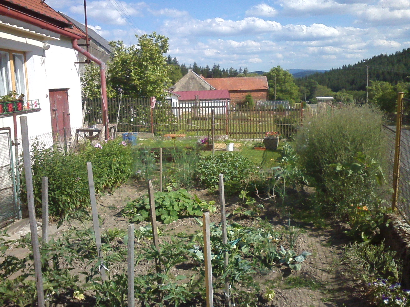 Zemědělství na Cihelně